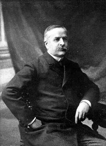 French geologist Albert-Auguste Cochon de Lapparent (1839-1908)